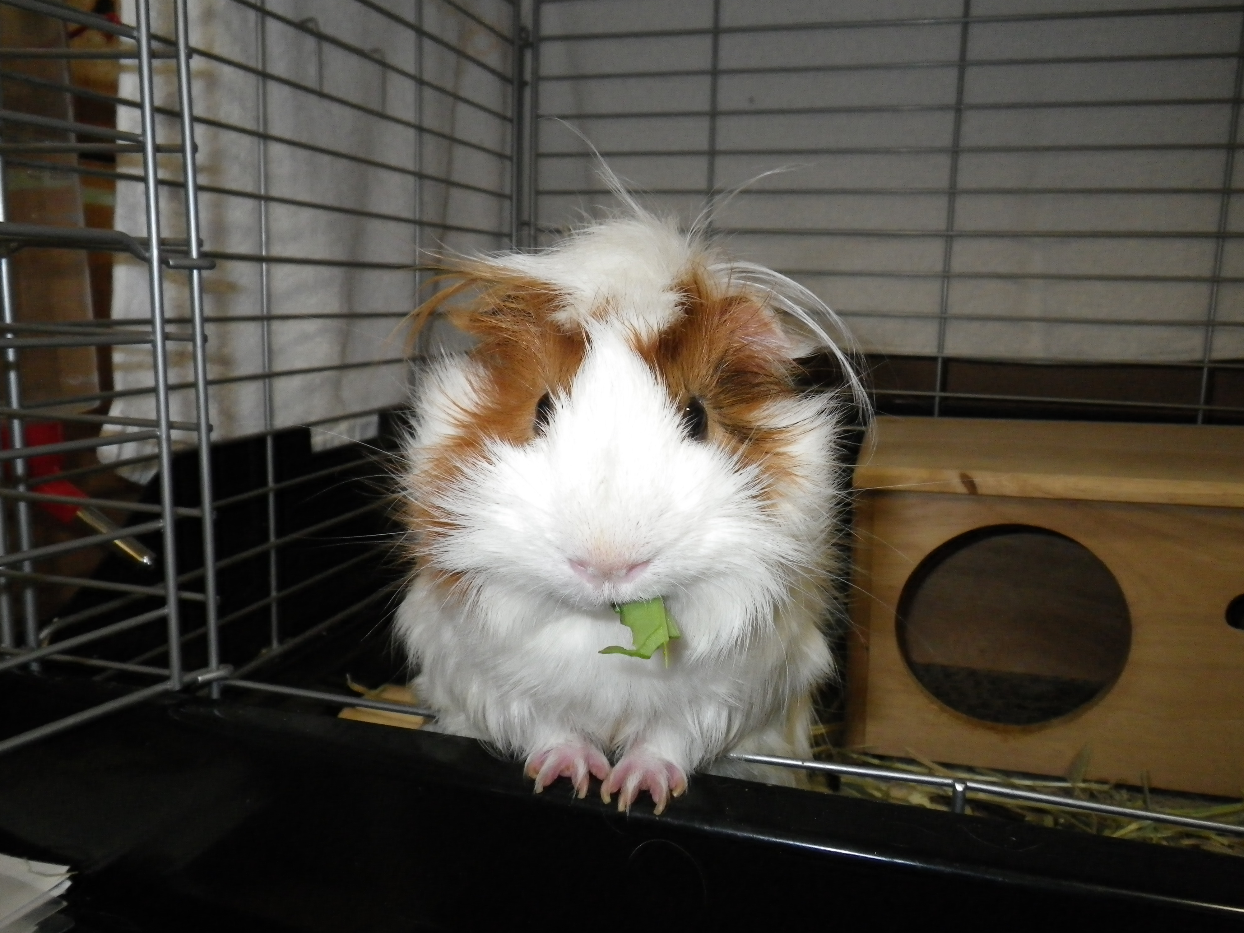 モルモットのモルちゃん